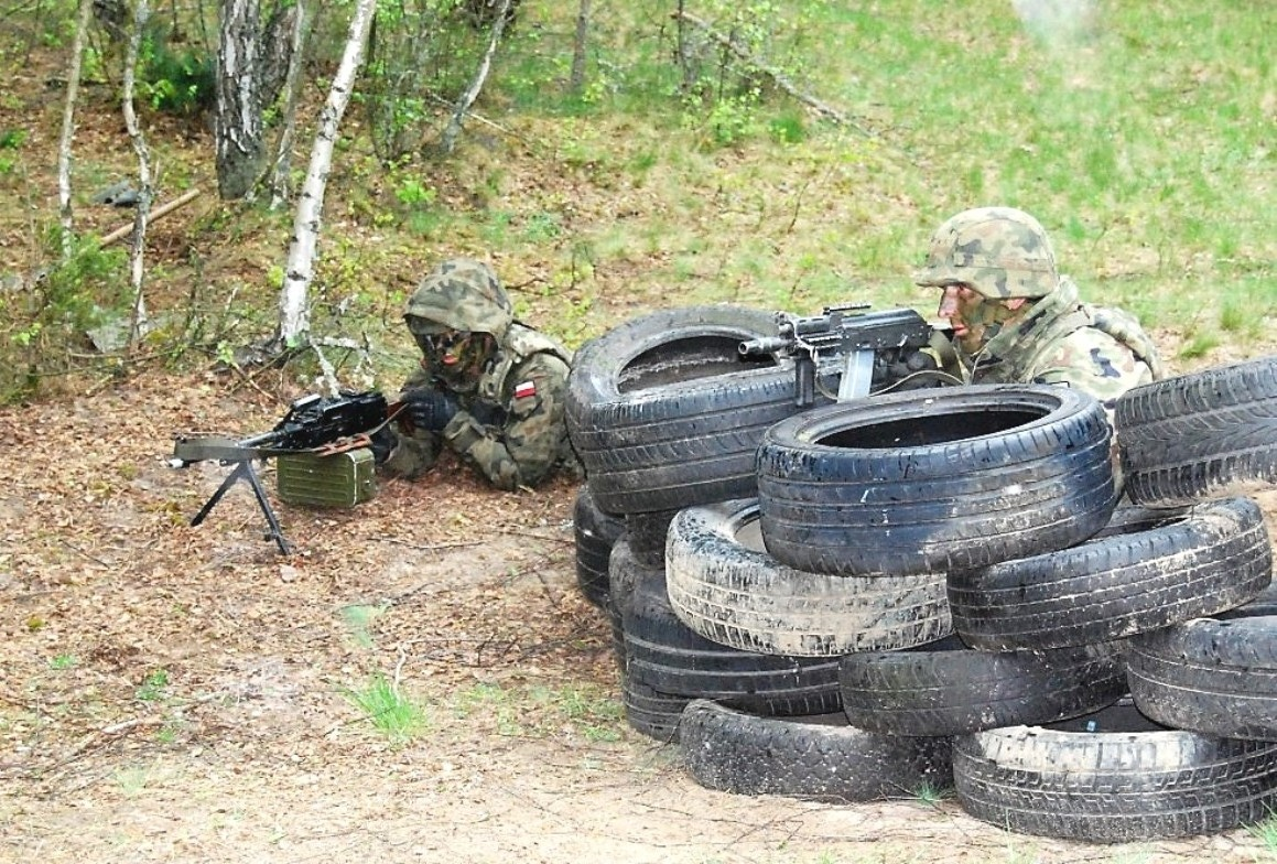 Żołnierz 2bzmot z km PK